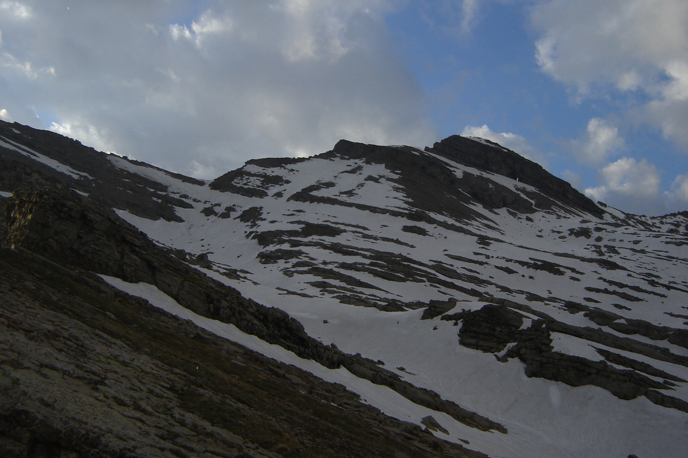 La têter de l'Estrop vue du Sud